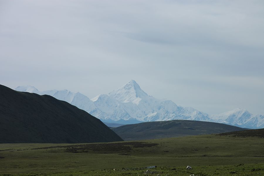 中国四川贡嘎山，群山之上有贡嘎